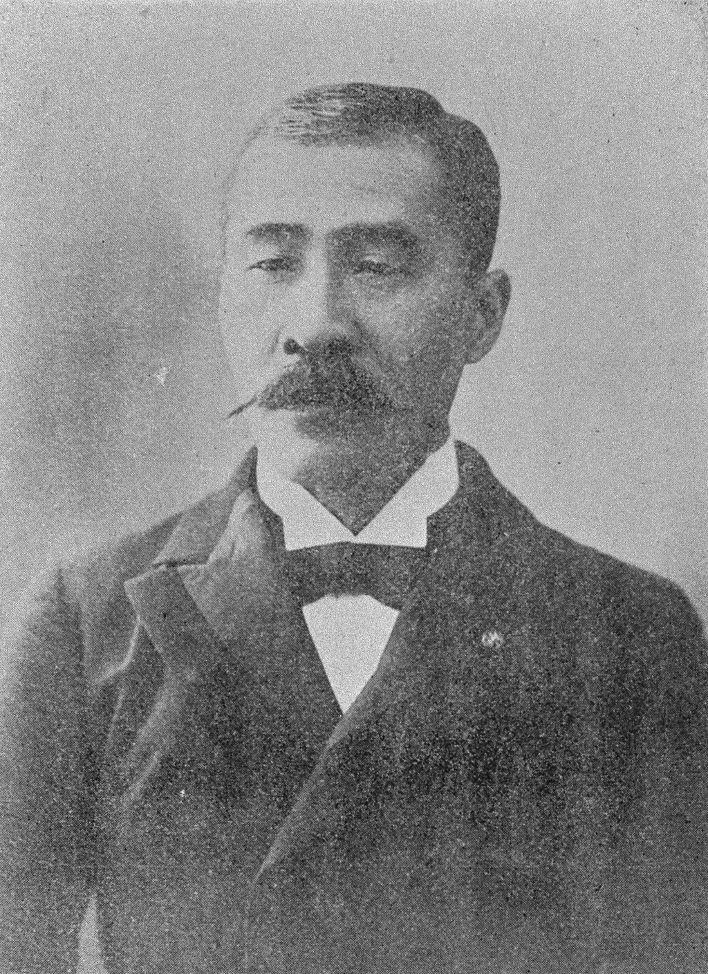 Portrait of Terahara Osateru (寺原長輝, 1855 – 1912)